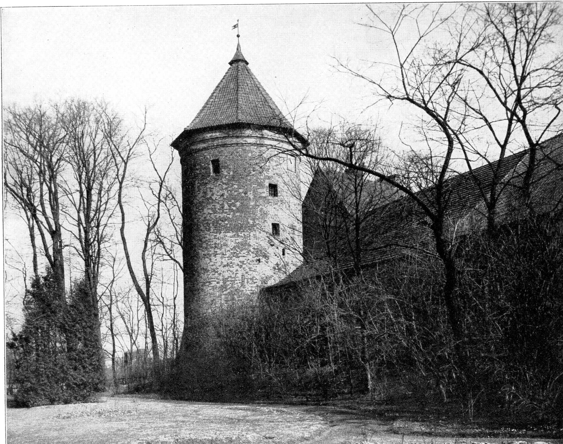 Insterburg